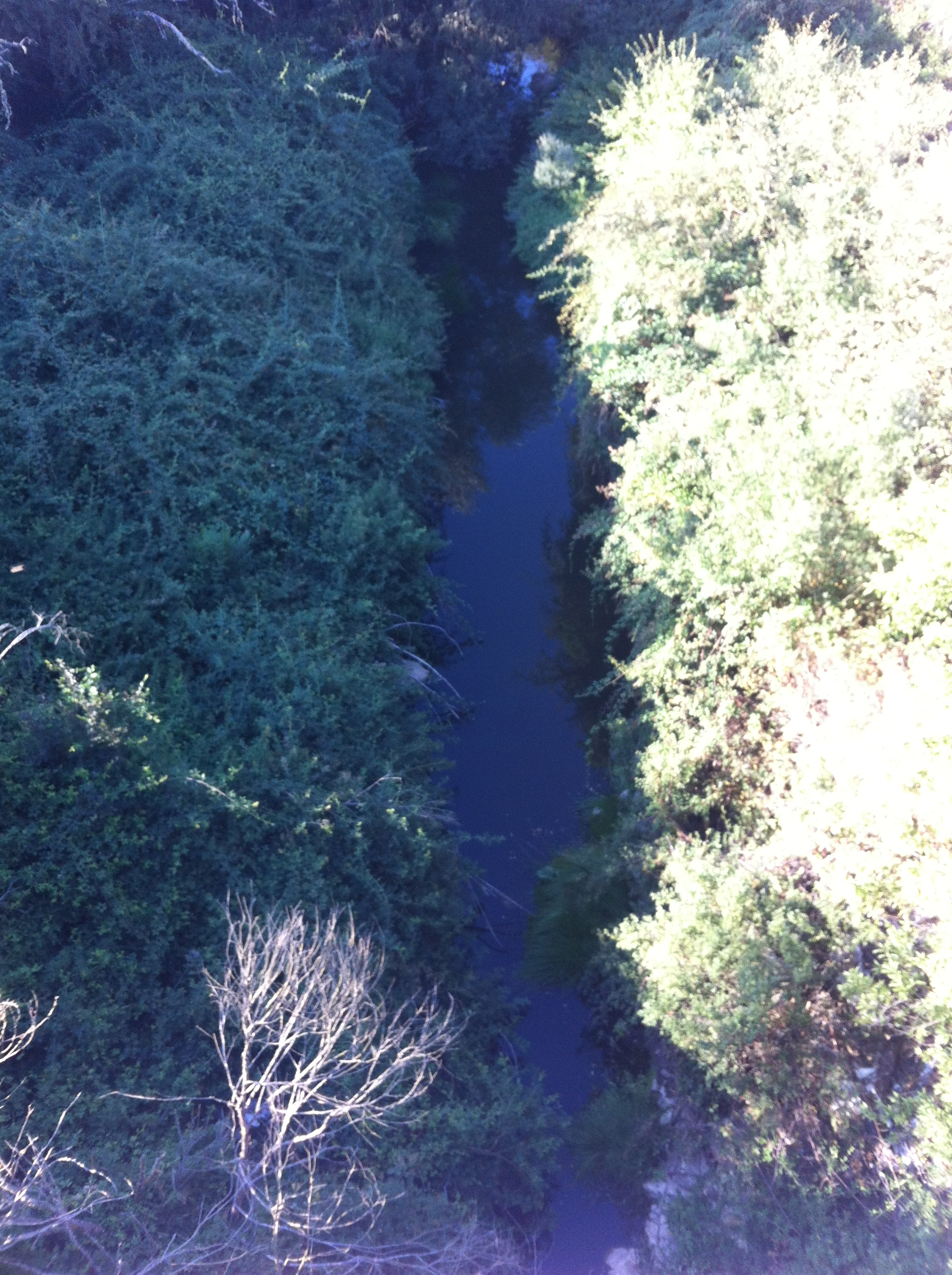 La Ribera de Peñausende